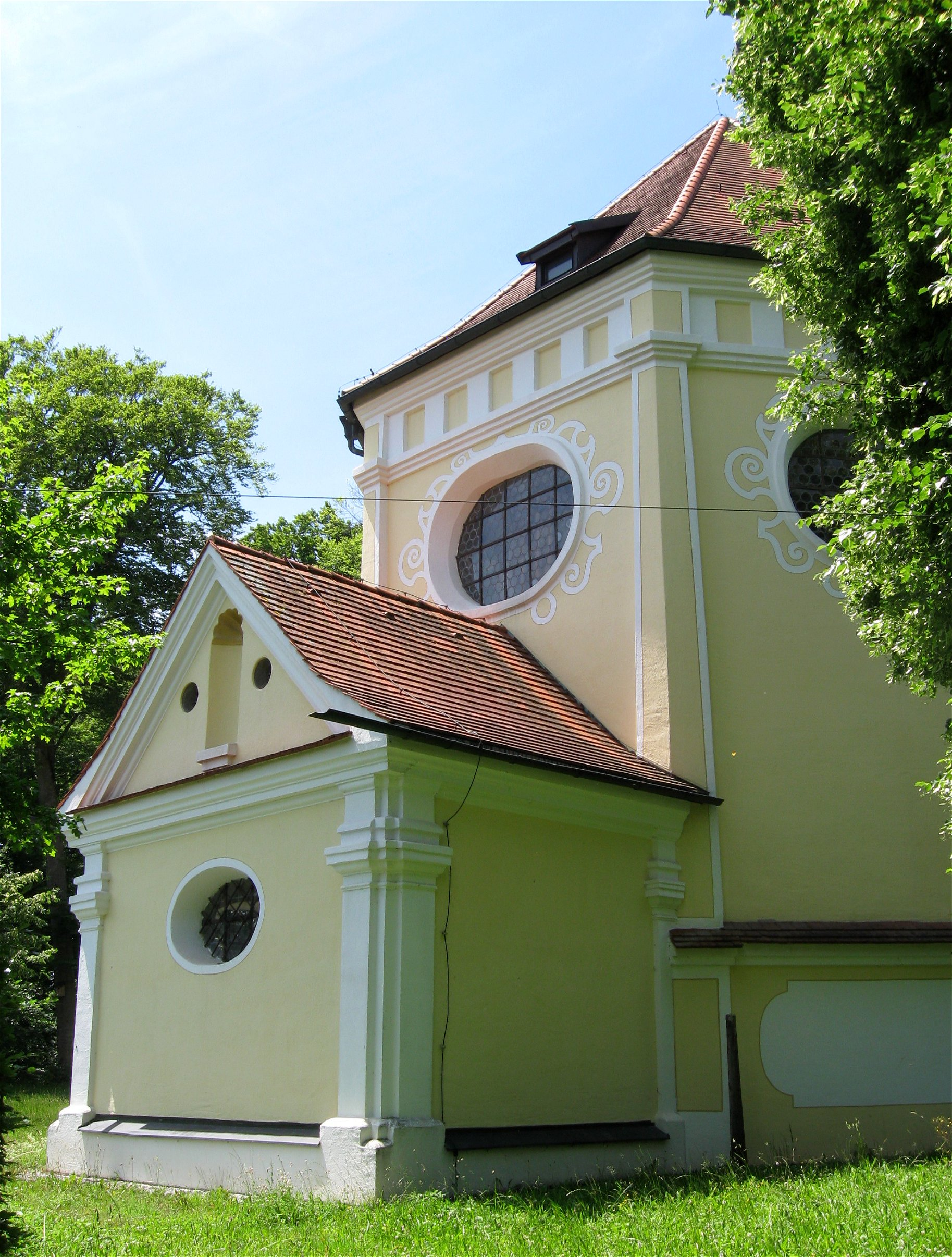 Memminger Straße 42; Katholische Kapelle St. Katharina achteckiger Zentralbau mit Dachreiter, mit Verbindungsbau zum anschließenden ehem. Mesnerhaus, 1606/07, Umgestaltung 1. Hälfte 18. Jahrhundert; mit Ausstattung. D-7-78-173-115